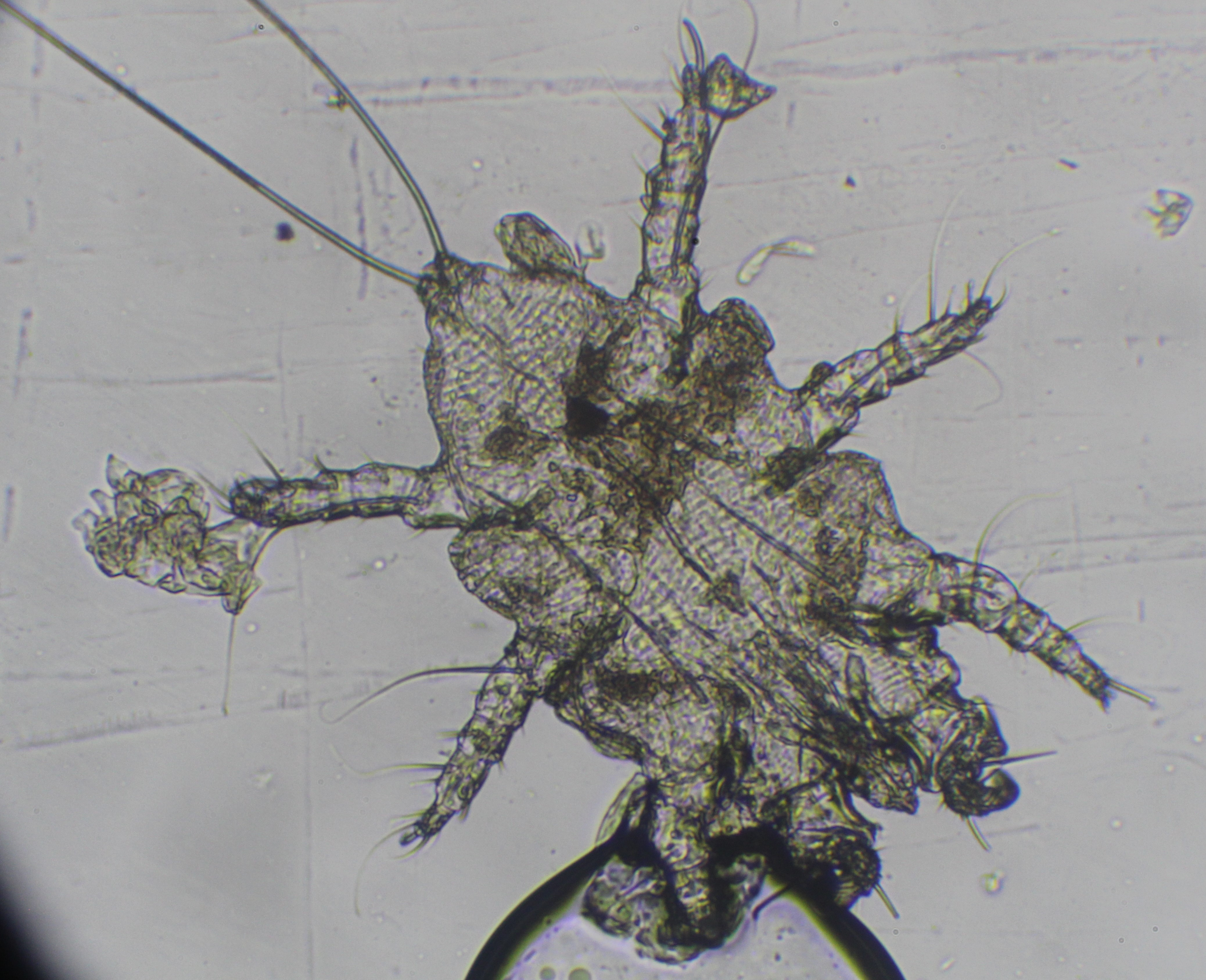 самець кліща миобія мускулі